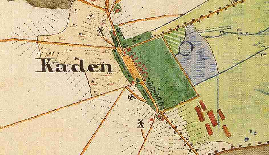 Kaden, Gemeindeteil im Ortsteil Duben der Stadt Luckau, Lkr. Dahme-Spreewald, Brandenburg, Deutschland, Ausschnitt aus dem Urmesstischblatt 4048 Schönwalde von 1847